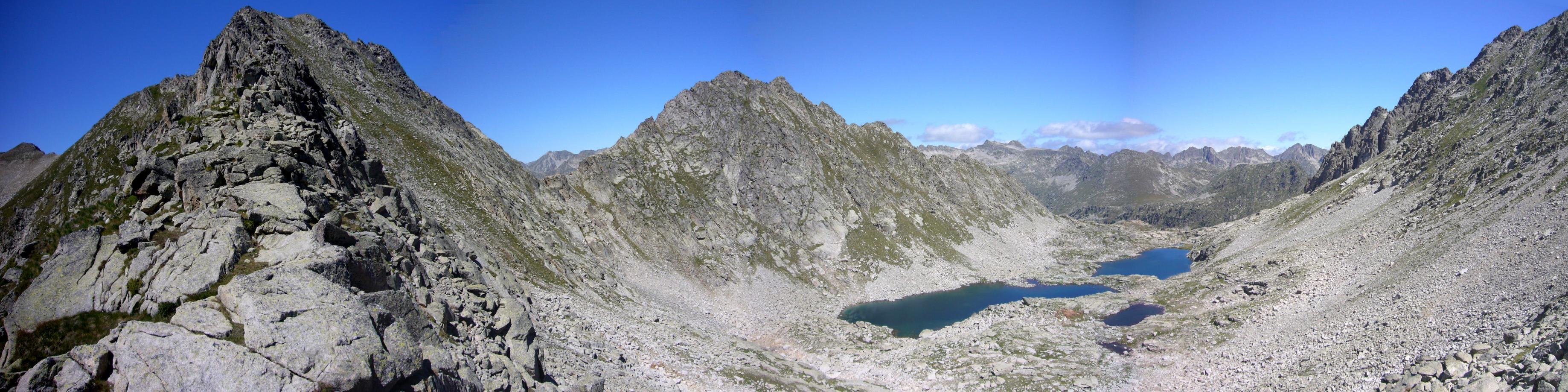 Estanys dels Gavatxos, vistos des de la Collada dels Gavatxos; la Vall de Boí, Alta Ribagorça, Catalunya